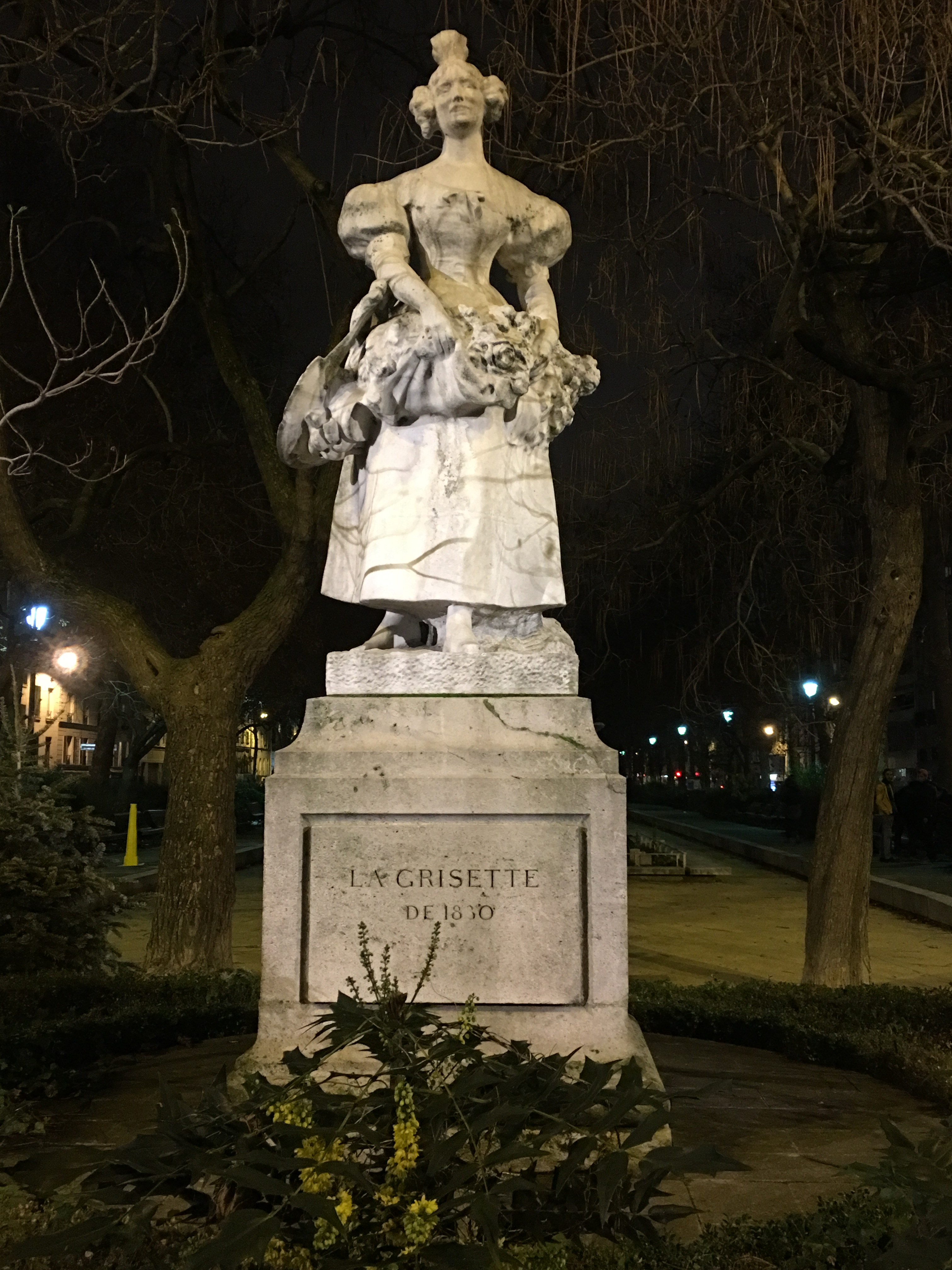 Statue de la Grisette, sculpture de Jean-Bernard Descomps réalisée en 1911. Elle se situe square Jules Ferry à Paris.